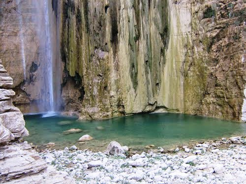 Lamadaya water falls, in Sanaag, Somalia